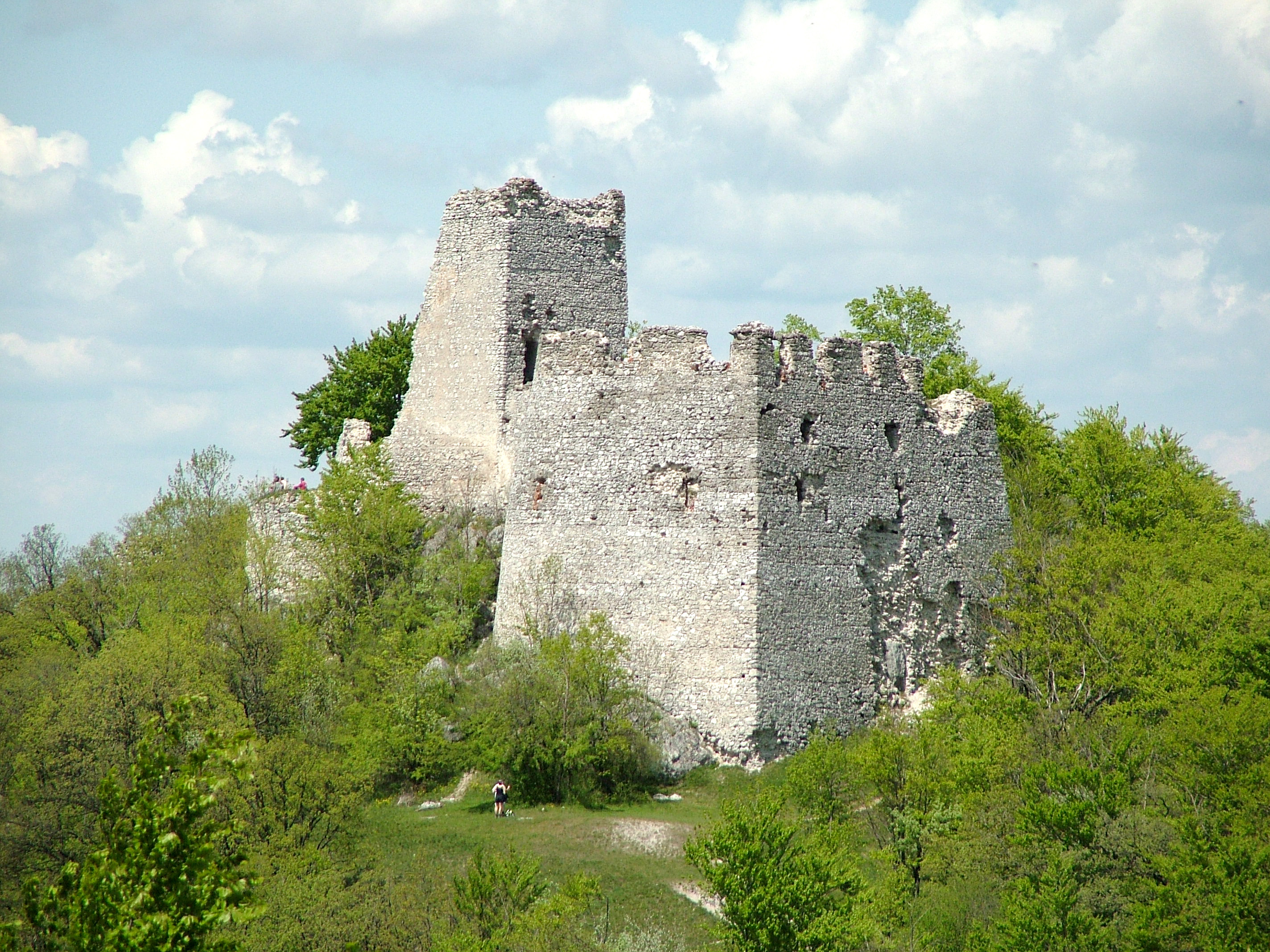 Hrad Tematín